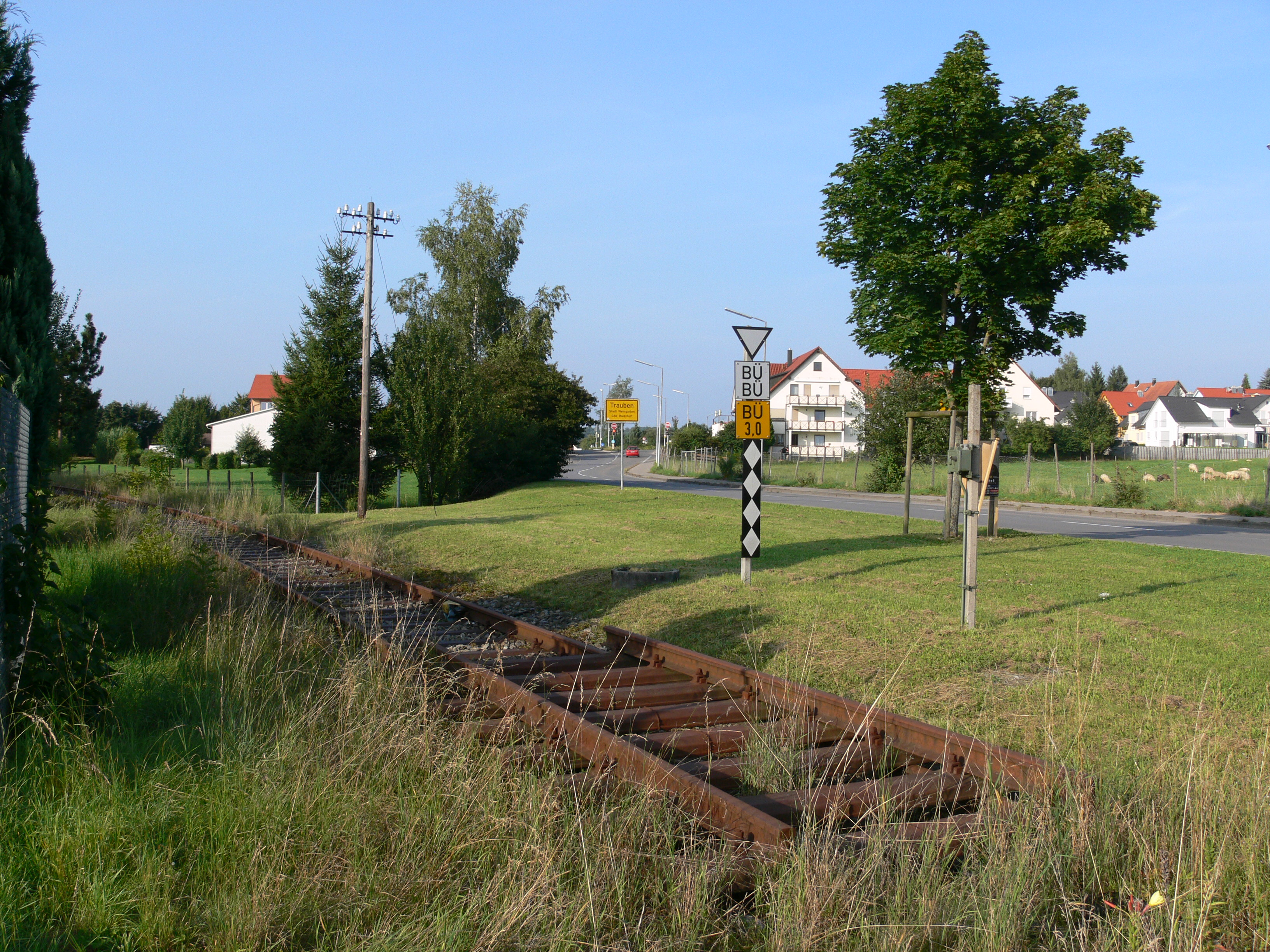 Gleise der ehemaligen Nebenbahn Niederbiegen–Weingarten Weingarten, zwischen Haltestelle Traubenhof und Weingarten Bahnhof, Blick in Fahrtrichtung Baienfurt/Niederbiegen